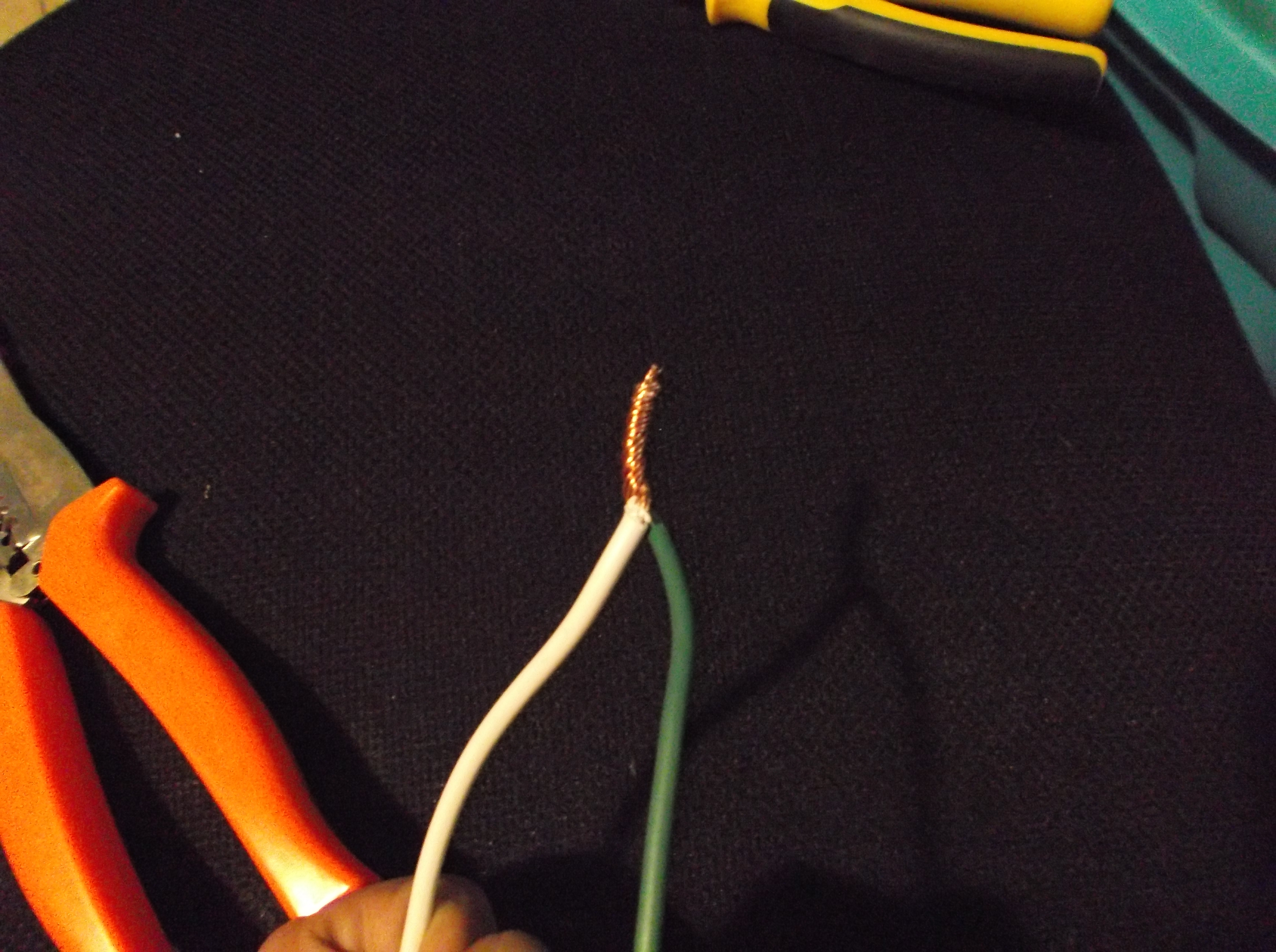 Amarre cola de rata